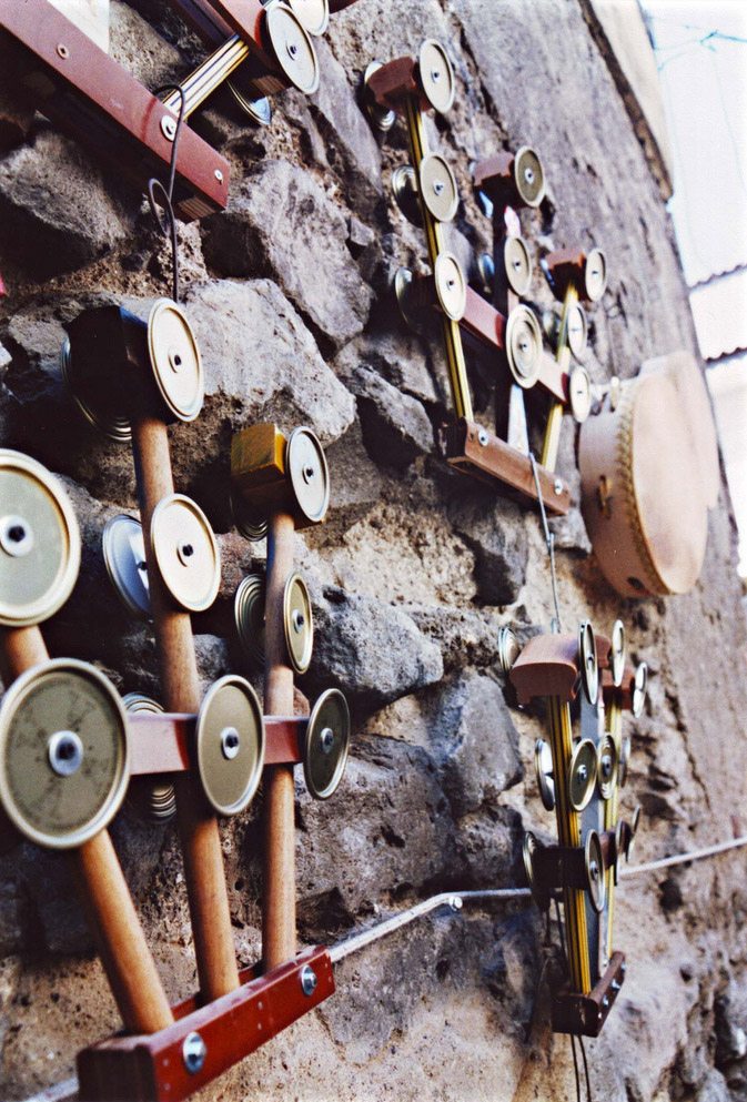 Triccheballacche : Strumenti musicali popolari della Campania - Italia. License on Flickr (2011-02-13): CC-BY-SA-2.0 Flickr tags: Triccheballacche;, Tamorre;, Pagani, Festa Madonna della galline, Madonnadellegalline